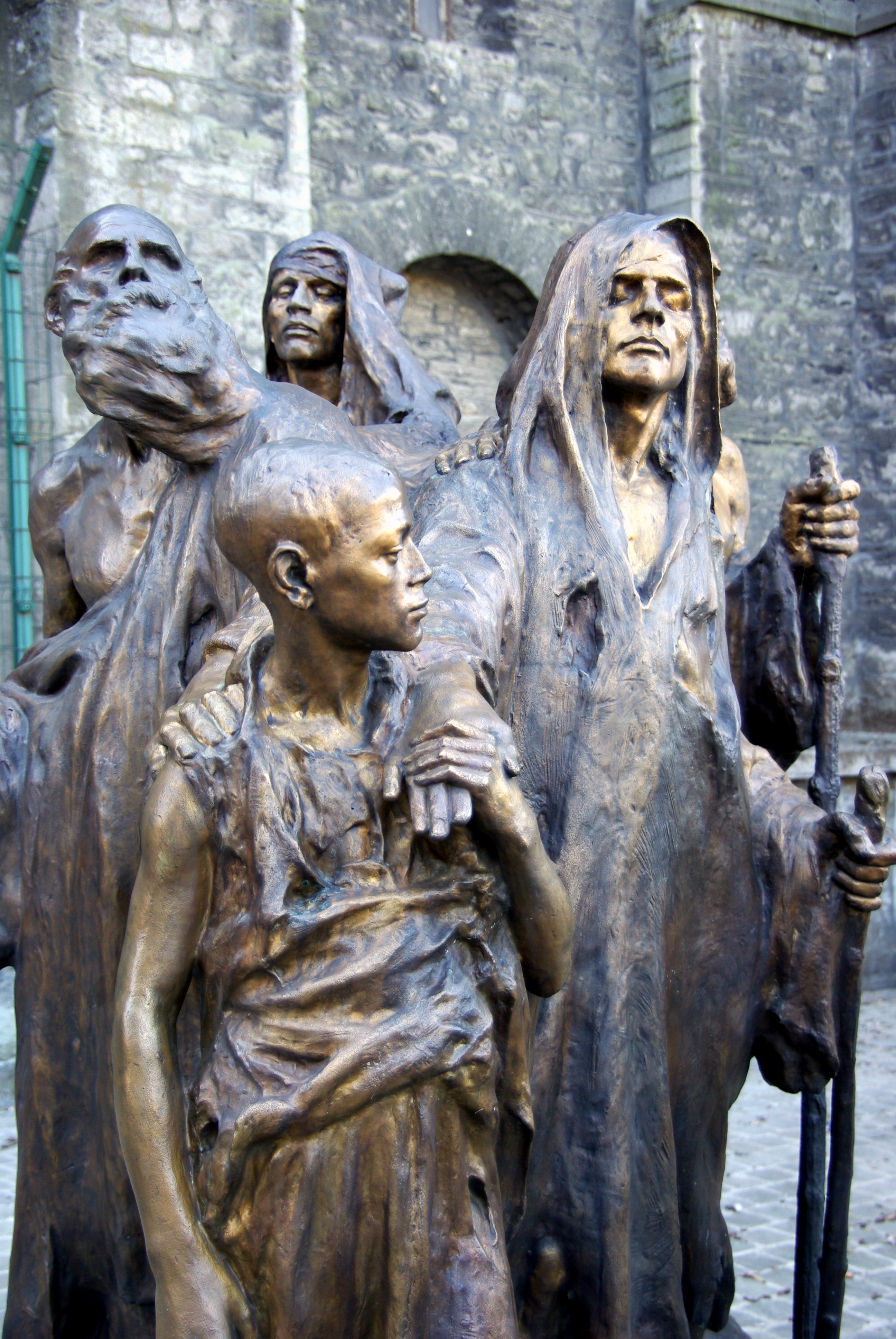 Ce groupe de quatre aveugles guidé par un enfant se situe à TOURNAI derrière la cathédrale. Il s'agit d'une oeuvre en bronze de Guillaume Charlier (1908).